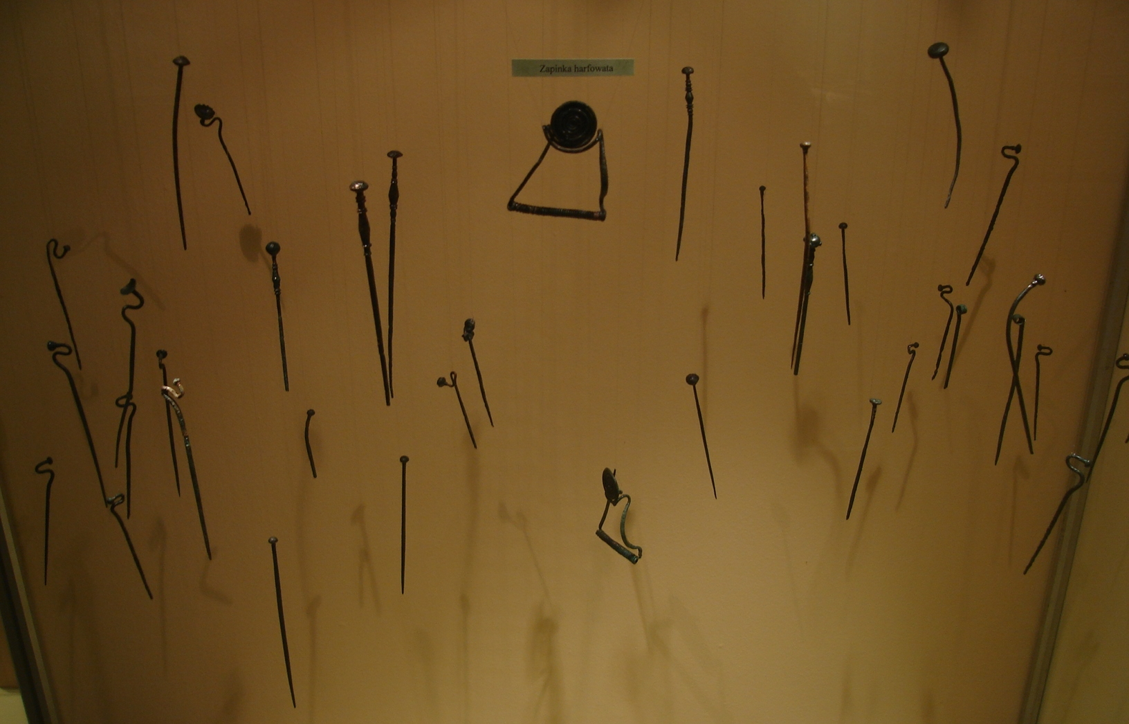 Szpile oraz dwie zapinki harfowate z kultury łużyckiej.